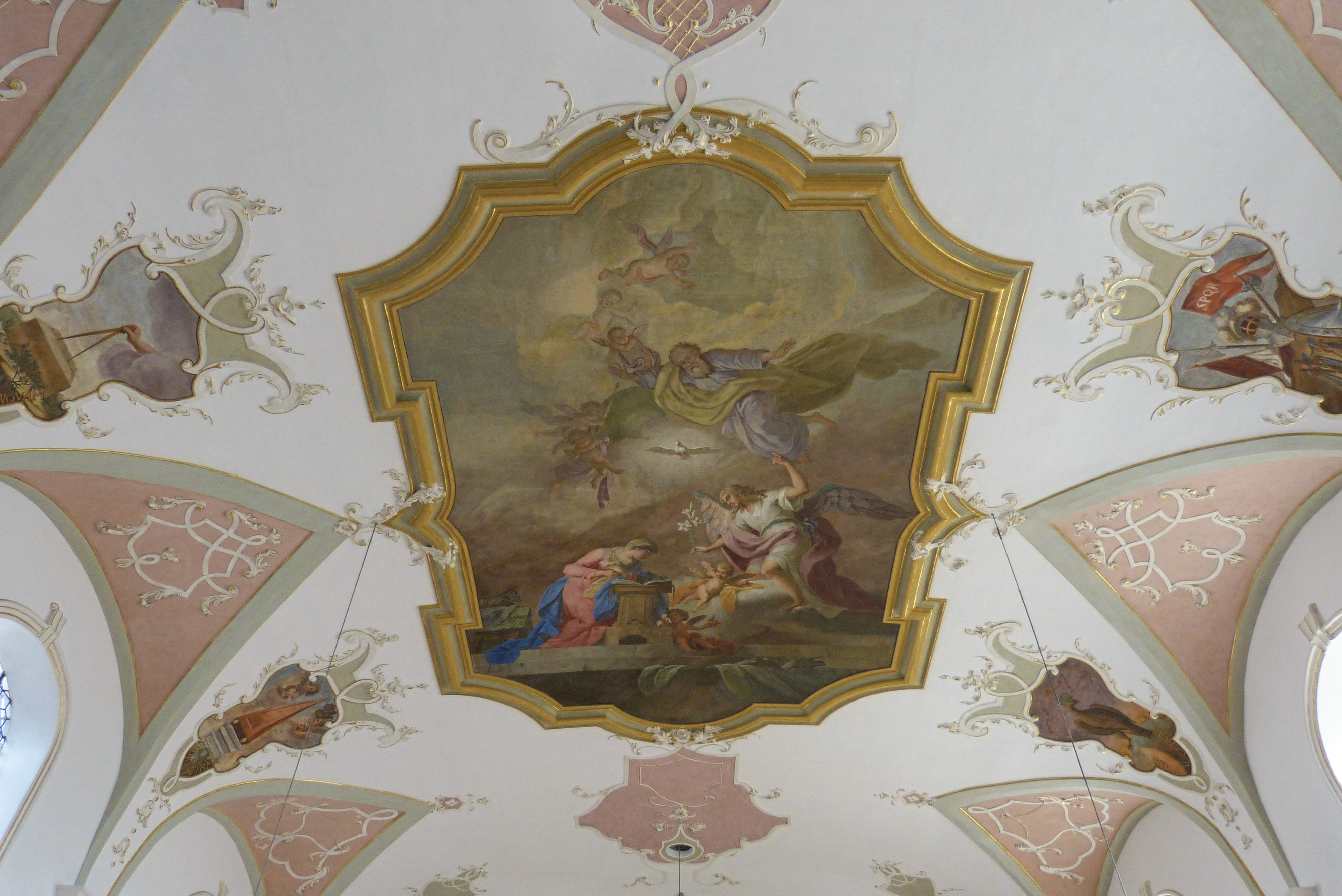 Deckenfresco in der Wallfahrtskirche St. Maria von Loreto auf dem Kobel in Westheim (Neusäß)